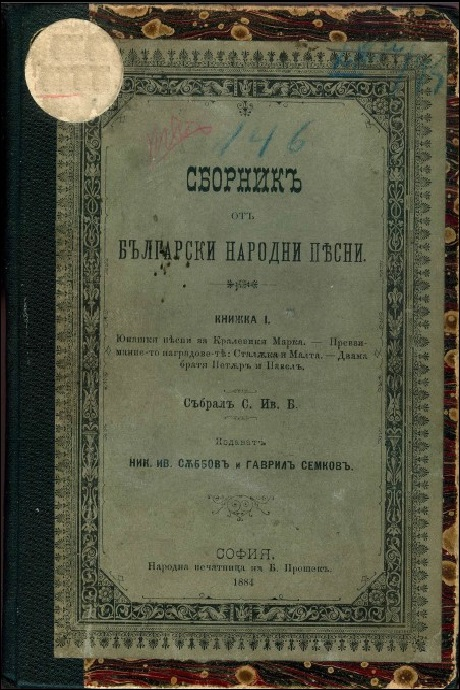 Корица на сборника на Серафим Боянов